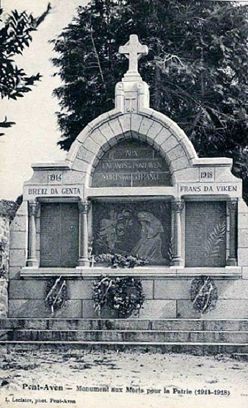 Le monument aux morts de Pont-Aven (carte postale de Laurent Leclaire [1867-1929])